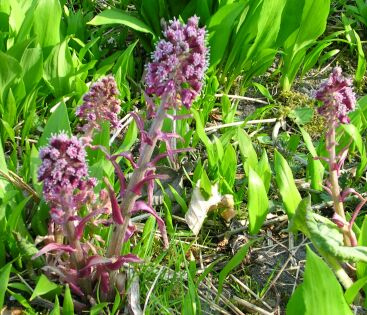 Billede af Rød hestehov taget den 2003-04-19 på Sjællands odde af BrianHansen, der oplyser, at det frigives under GFDL iflg. Malene.